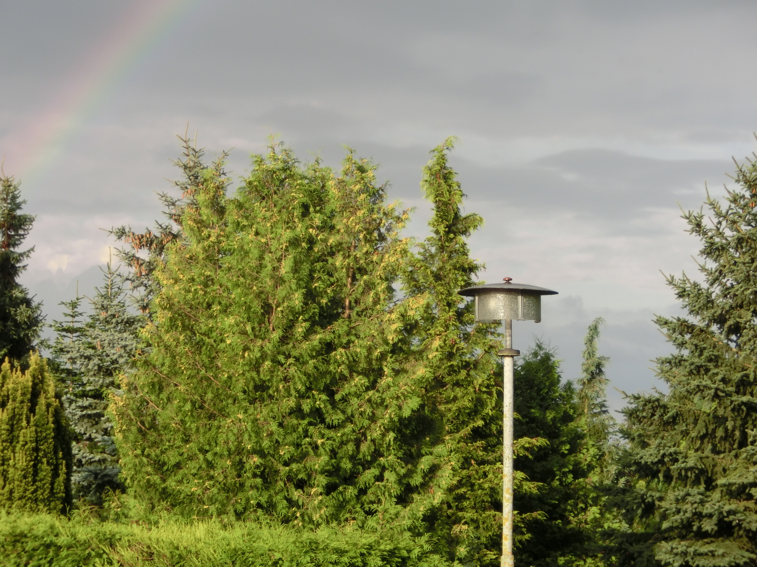 Einheitslaterne der Deutschen Demokratischen Republik